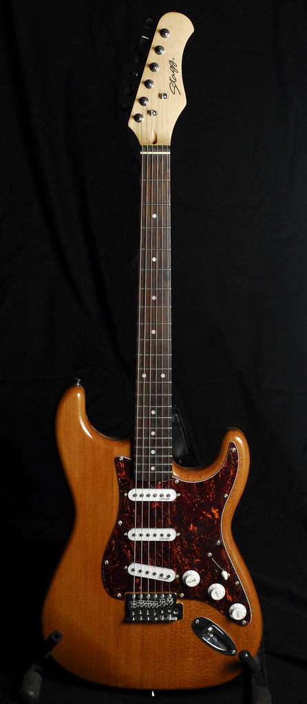 Stagg Strat